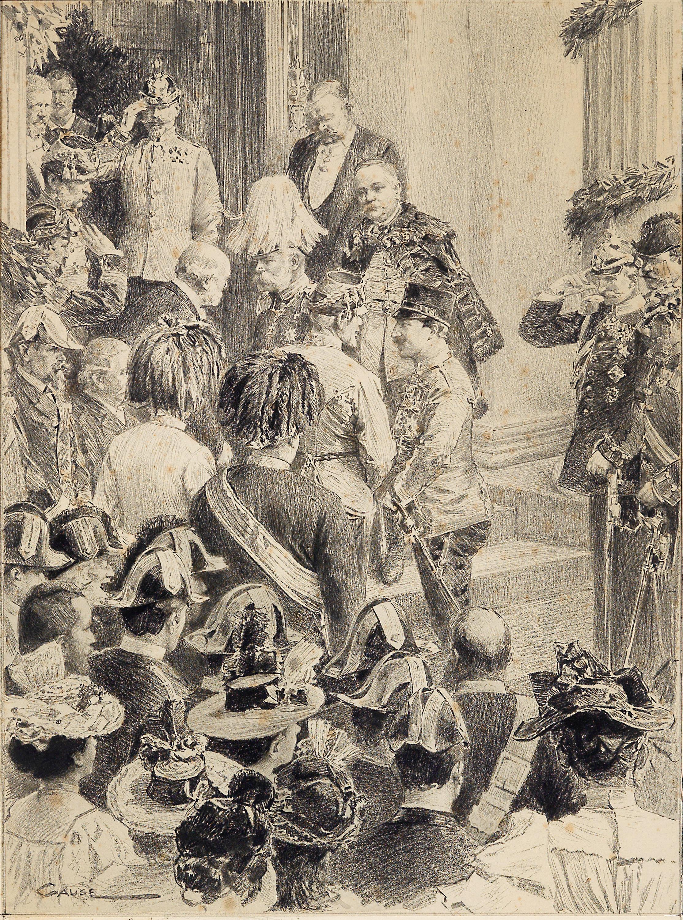 Kaiser Franz Joseph I. und Kaiser Wilhelm II. in Abbazia vor dem Hotel Stephanie (heute Hotel Imperial), Bleistiftzeichnung auf Papier, signiert "Gause", 44 x 32,5 cm